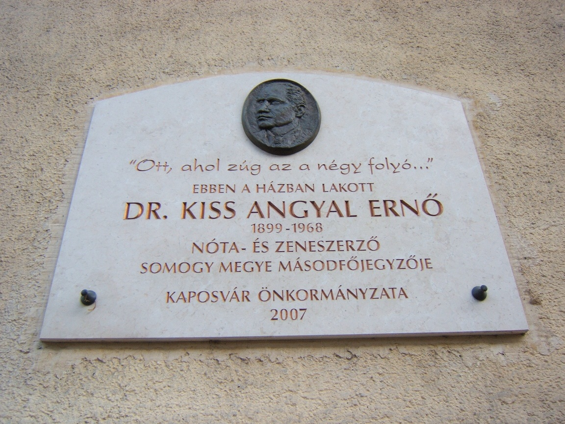 Kaposvár, Bajcsy-Zs. utca 5. - Kiss Angyal Ernő emléktáblája